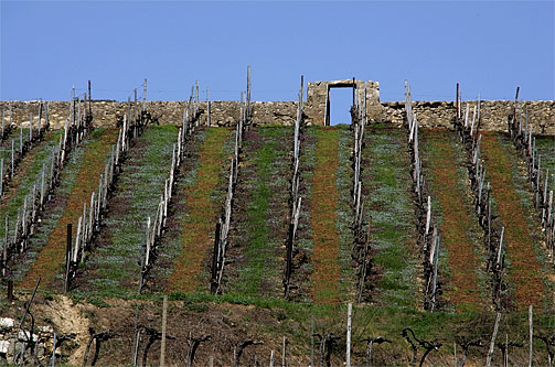 Boudry: Rebberg